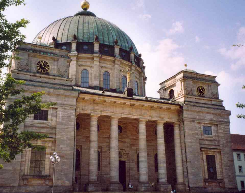 Sankt Blasien. Die ehemalige Benediktiner-Klosterkirche, zu Recht der „Dom” genannt. Ein frühklassizistisches Meisterwerk von Michel D’Ixnard, zu den großartigsten Werken dieses Stiles in Deutschland zählend.